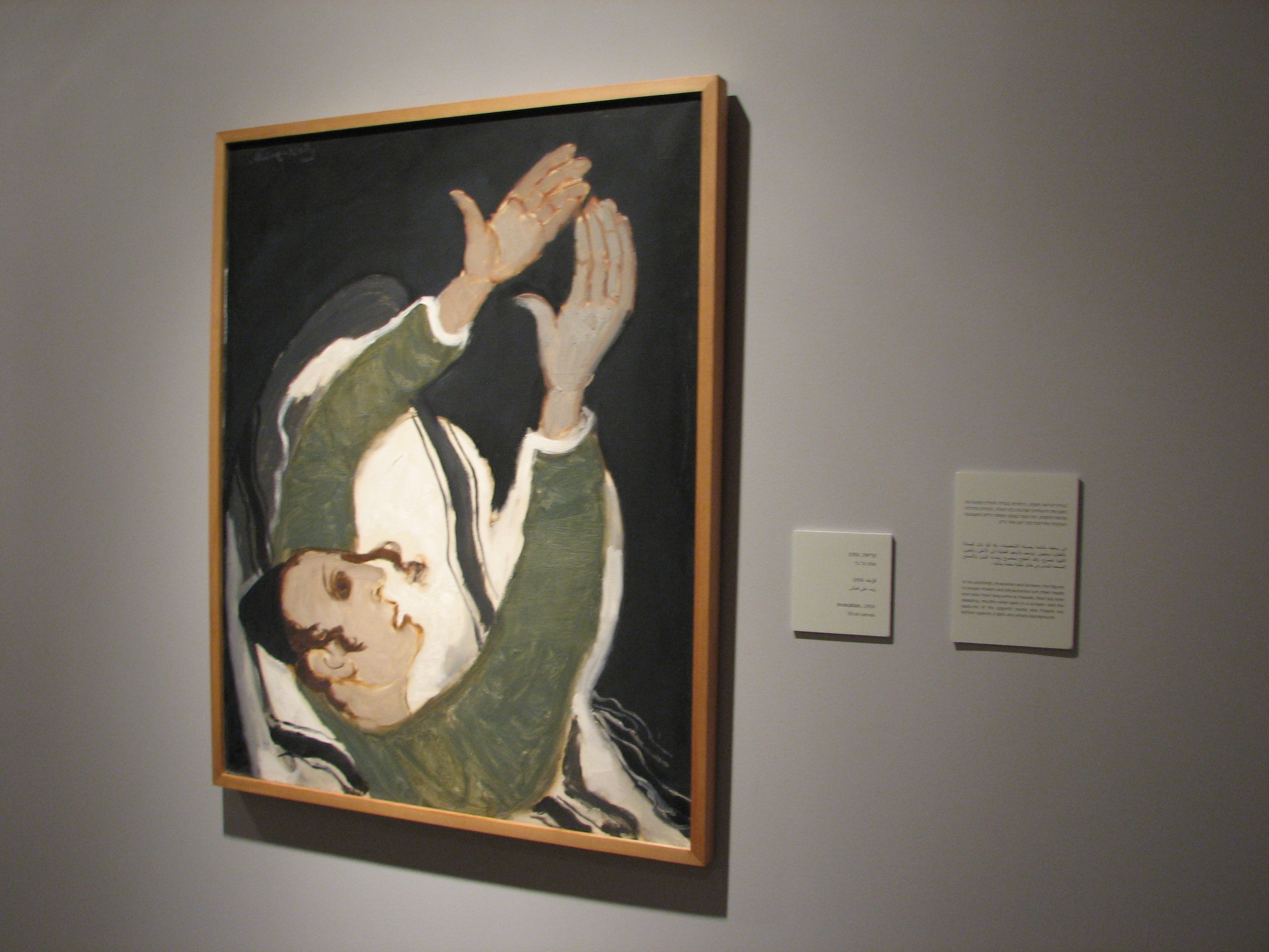 Mane Catz Museum , Haifa Israel Emmanuel Mané-Katz was a Jewish painterת best known for his depictions of the Jewish shtetl in Eastern Europe מוזיאון מאנה כץ הוא מוזיאון לאמנות בעיר חיפה, המוקדש ליצירתו של הצייר מאנה כץ. המוזיאון נמצא במרכז הכרמל ברחוב יפה נוף Invocation, 1956. Oil on canvas יצירה משנת 1956 "קריאה", שמן על בד